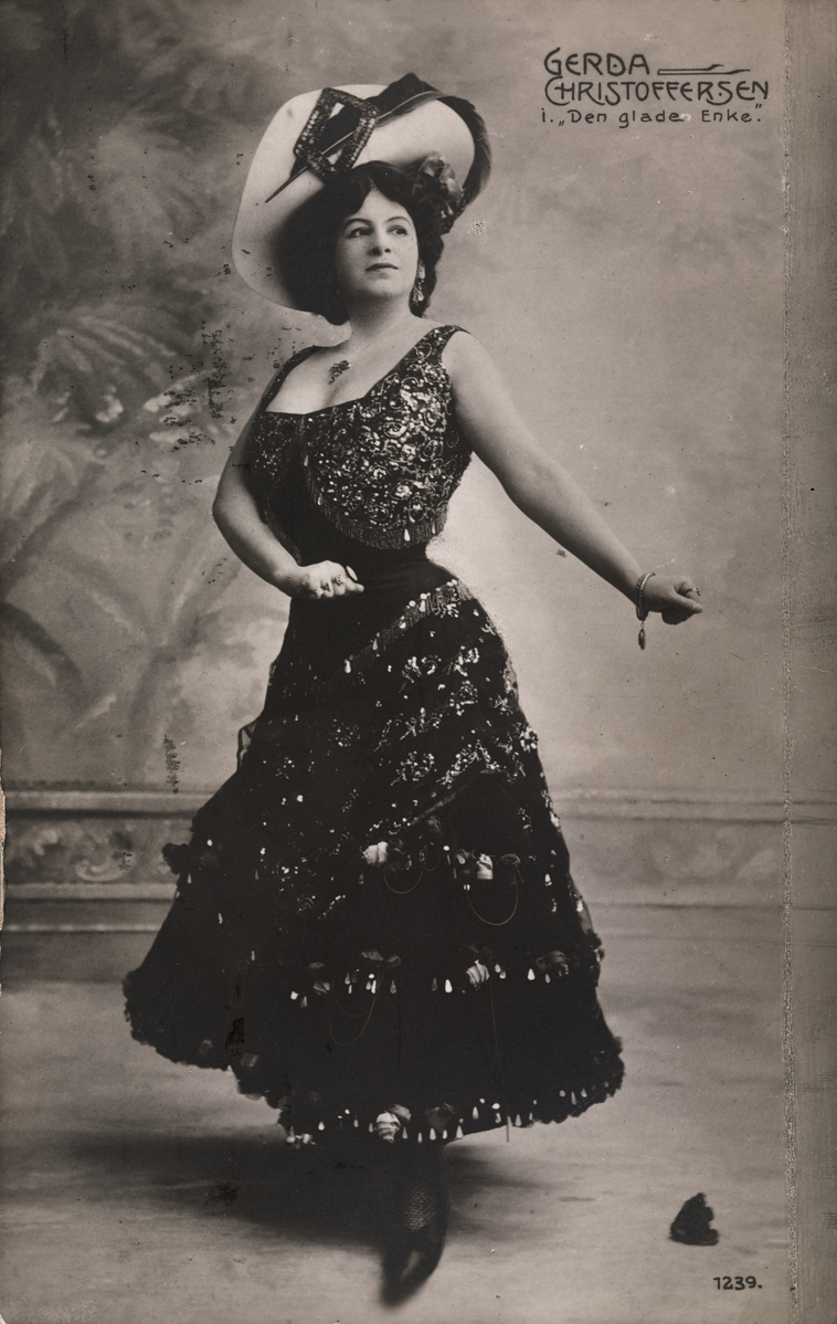 Den danske skuespilleren og sangeren Gerda Christophersen i hovedrollen som Hanna Glawari i operetten "Den glade enke", ca 1910-1912. Fotograf: Paul Hecksher.